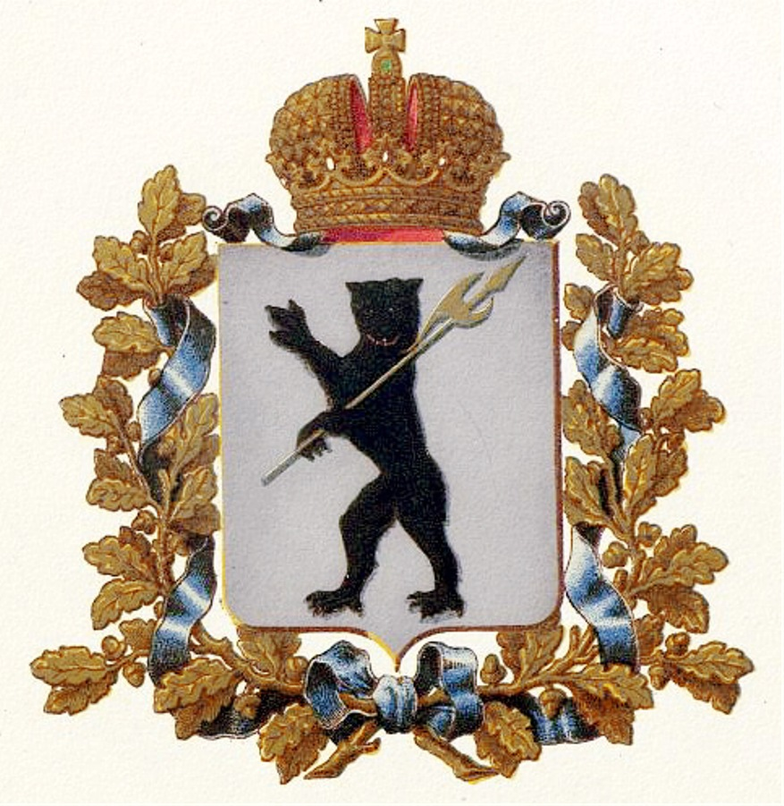 Official Russian Empire coat of arms Yaroslavl Governorate (not Yaroslavl City). Герб Российской Империи Ярославской губернии в Гербовнике Министерства внутренних дел Российской Империи. Утверждён Императором Всероссийским Александром Вторым в 1856 году.